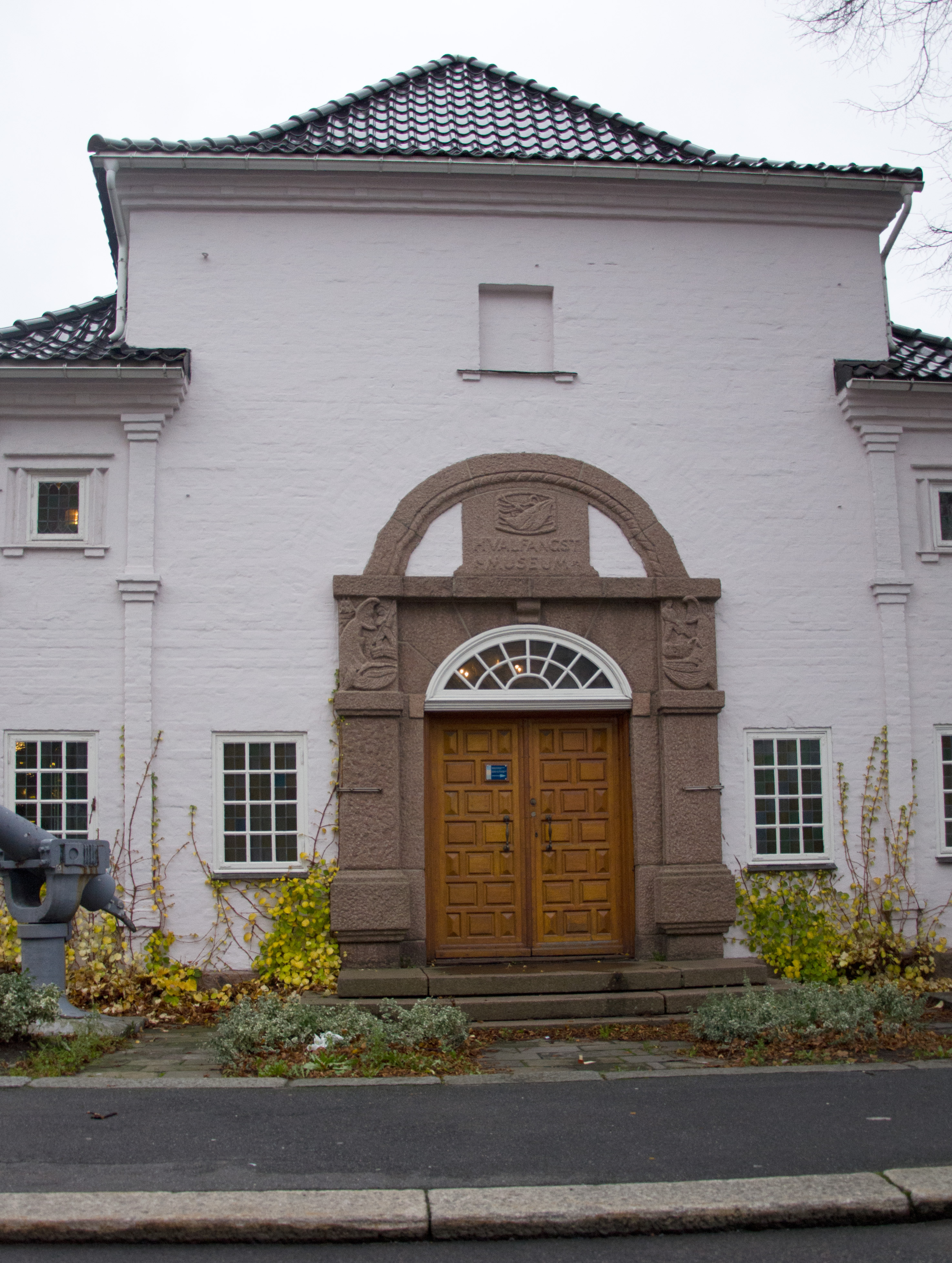 Hvalfangstmuseet i Sandefjord